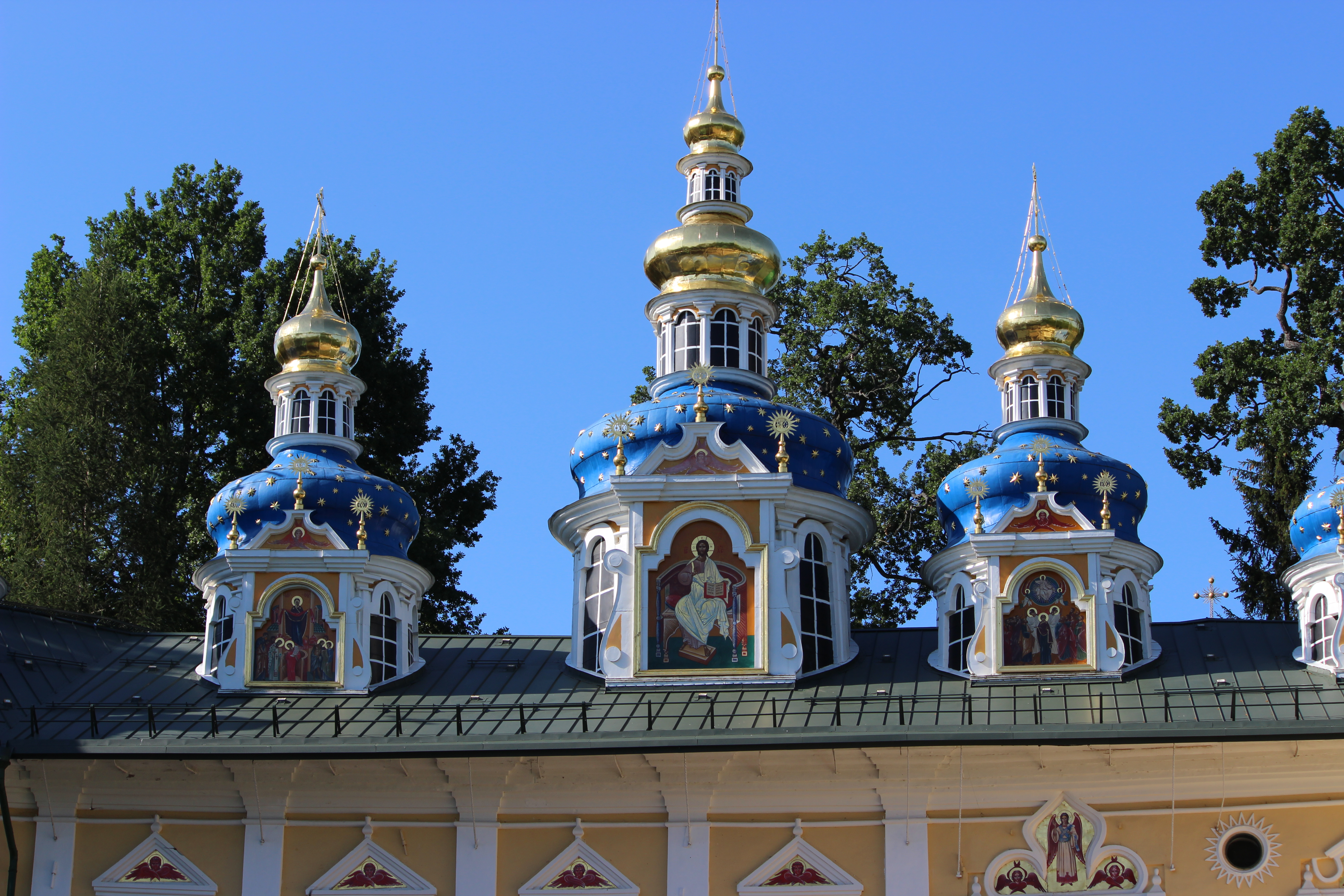 Ансамбль Псково-Печерского монастыря (Псковская область, Печоры, (на юго-восточной окраине города Печоры))